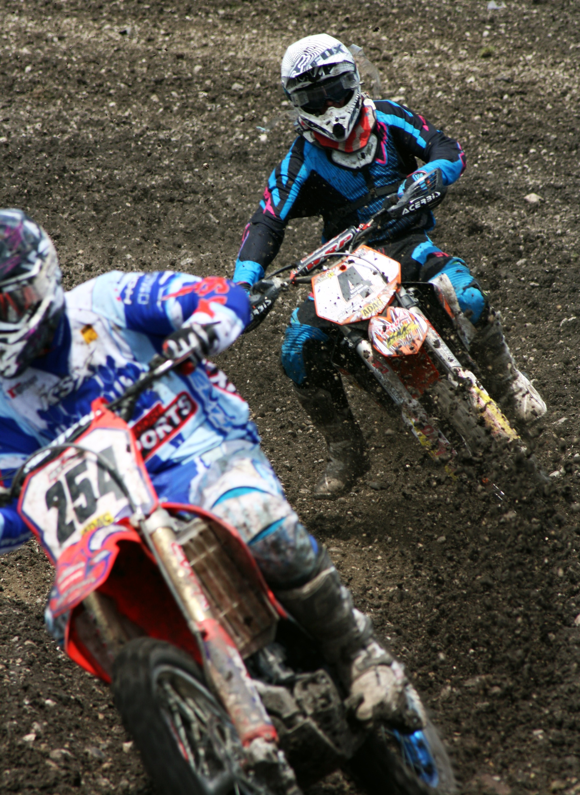 ADAC MX Masters in Freising. Motocorssrennen